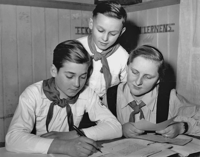 Etterwinden, JP eine Dorfchronik schreibend Zentralbild Albrecht 2.2.1953 Junge Pioniere schreiben Dorfchronik In einem Freundschaftsvertrag mit der Landwirtschaftlichen Produktionsgenossenschaft "Ernst Thälmann" in Etterwinden, Kreis Eisenach, verpflichteten sich die Jungen Pioniere des Ortes, die Geschichte des Dorfes zu studieren und eine Chronik zu schreiben. UBz: Nicht nur die Vergangenheit, sondern auch die Geschehnisse der Gegenwart werden in den Aufzeichnungen der Pioniere festgehalten. Eines Tages wird die Chronik eine anschauliche Darstellung von der Entwicklung einer Landwirtschaftlichen Produktionsgenossenschaft sein.